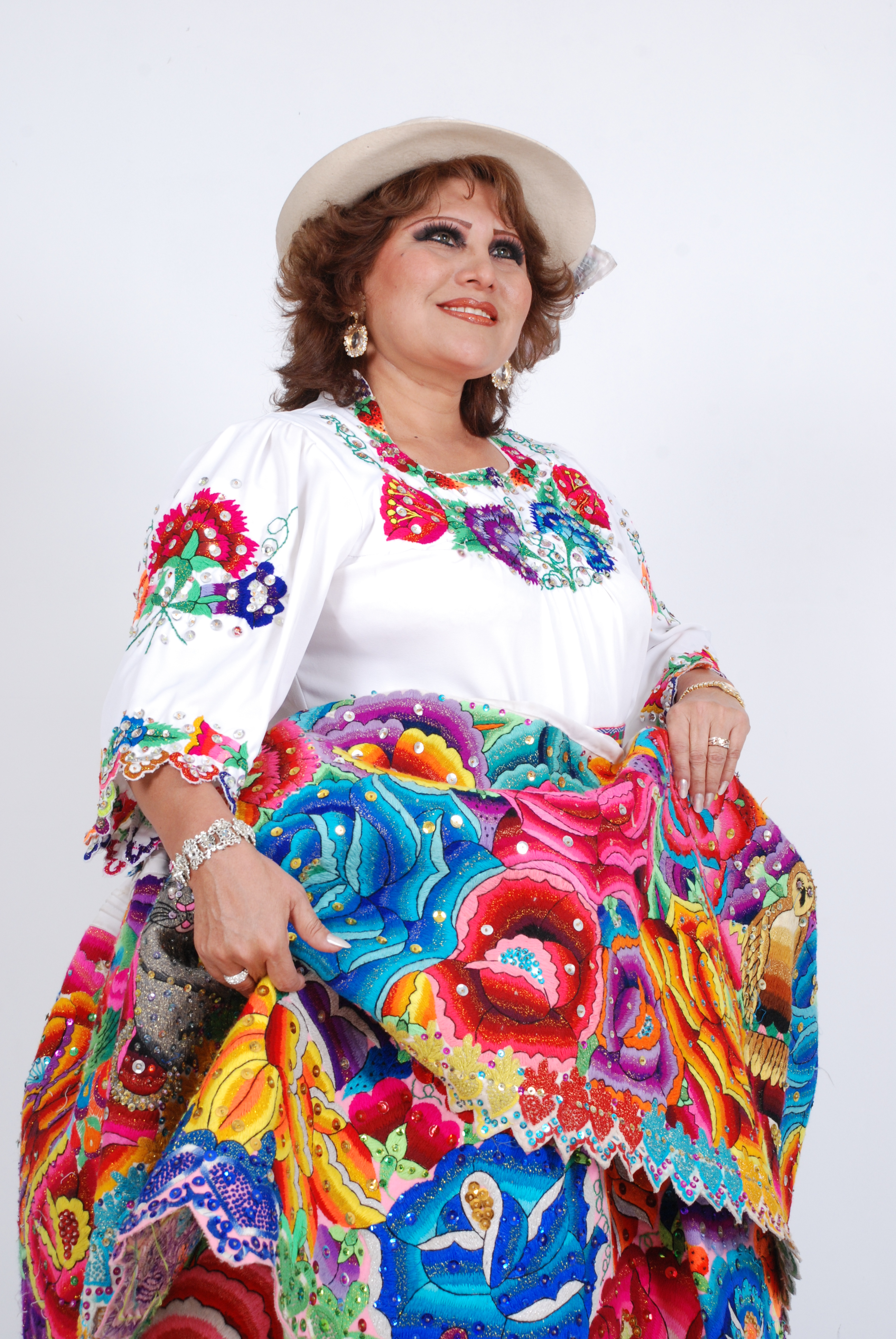 Amanda Portales "La Novia del Perú"